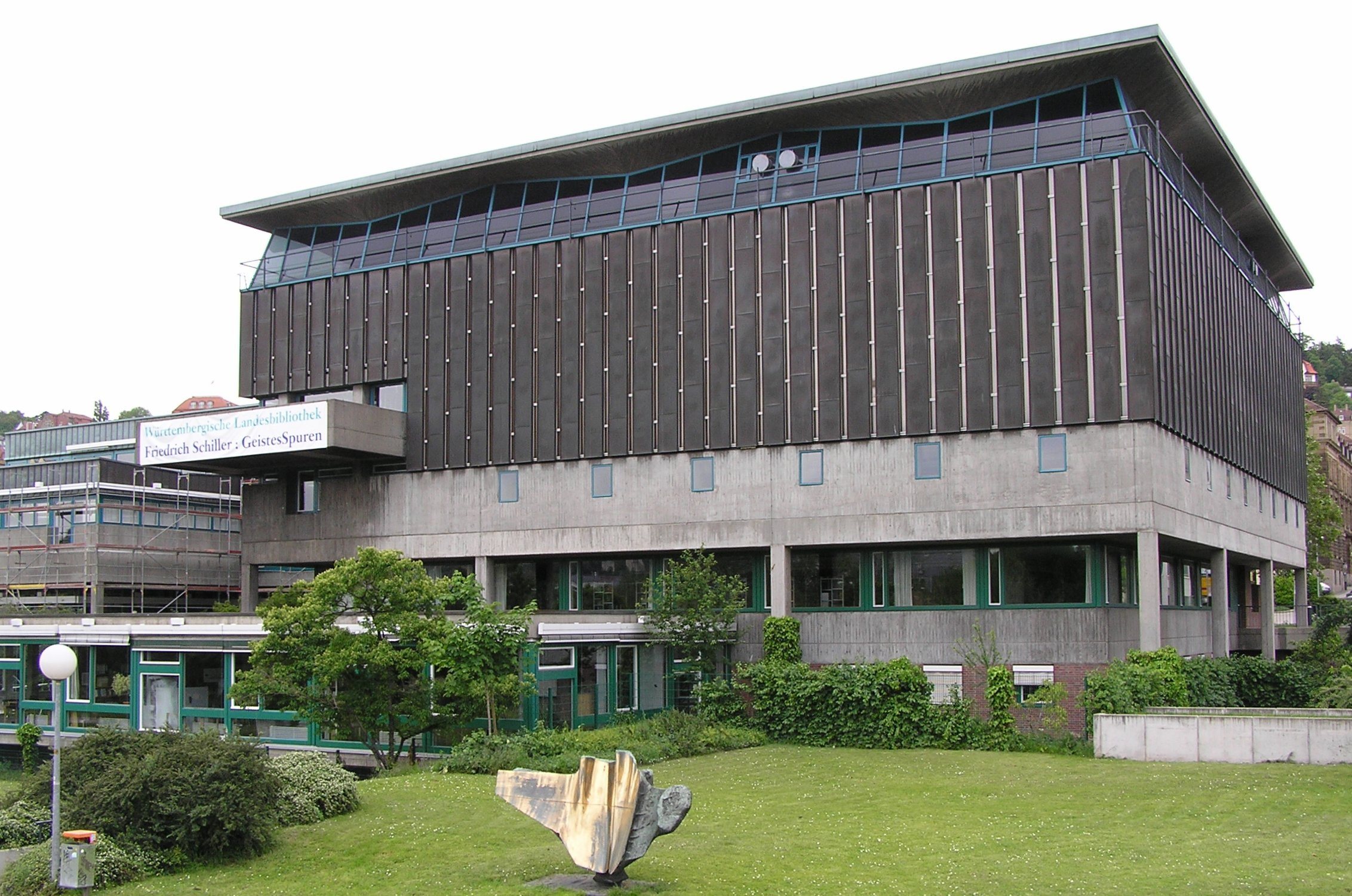 Württembergische Landesbibliothek Stuttgart with sculpture Montana I (1969) by Bernhard Heiliger.